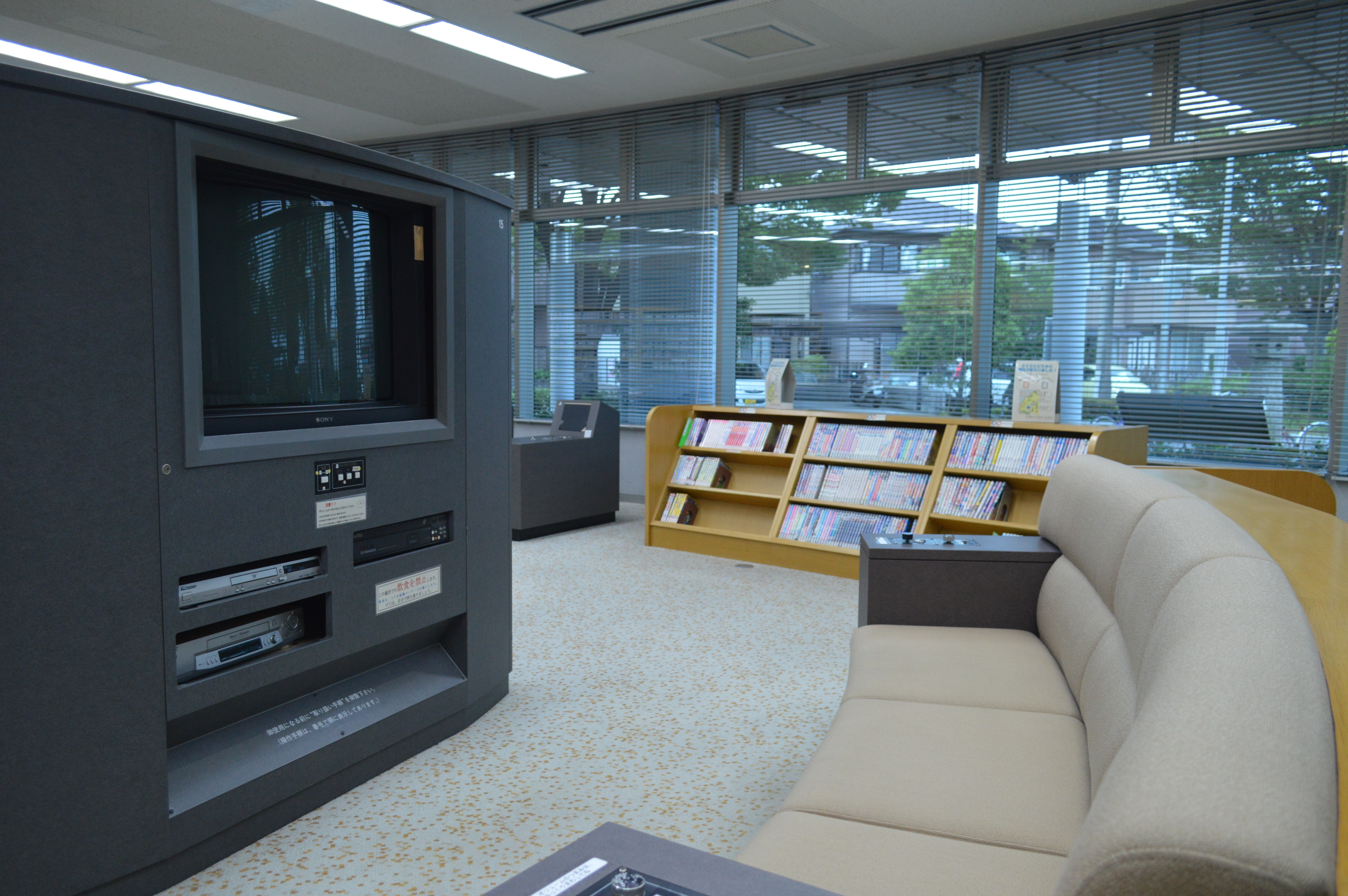 愛知県知多郡の東浦町中央図書館。1階の視聴覚コーナー。